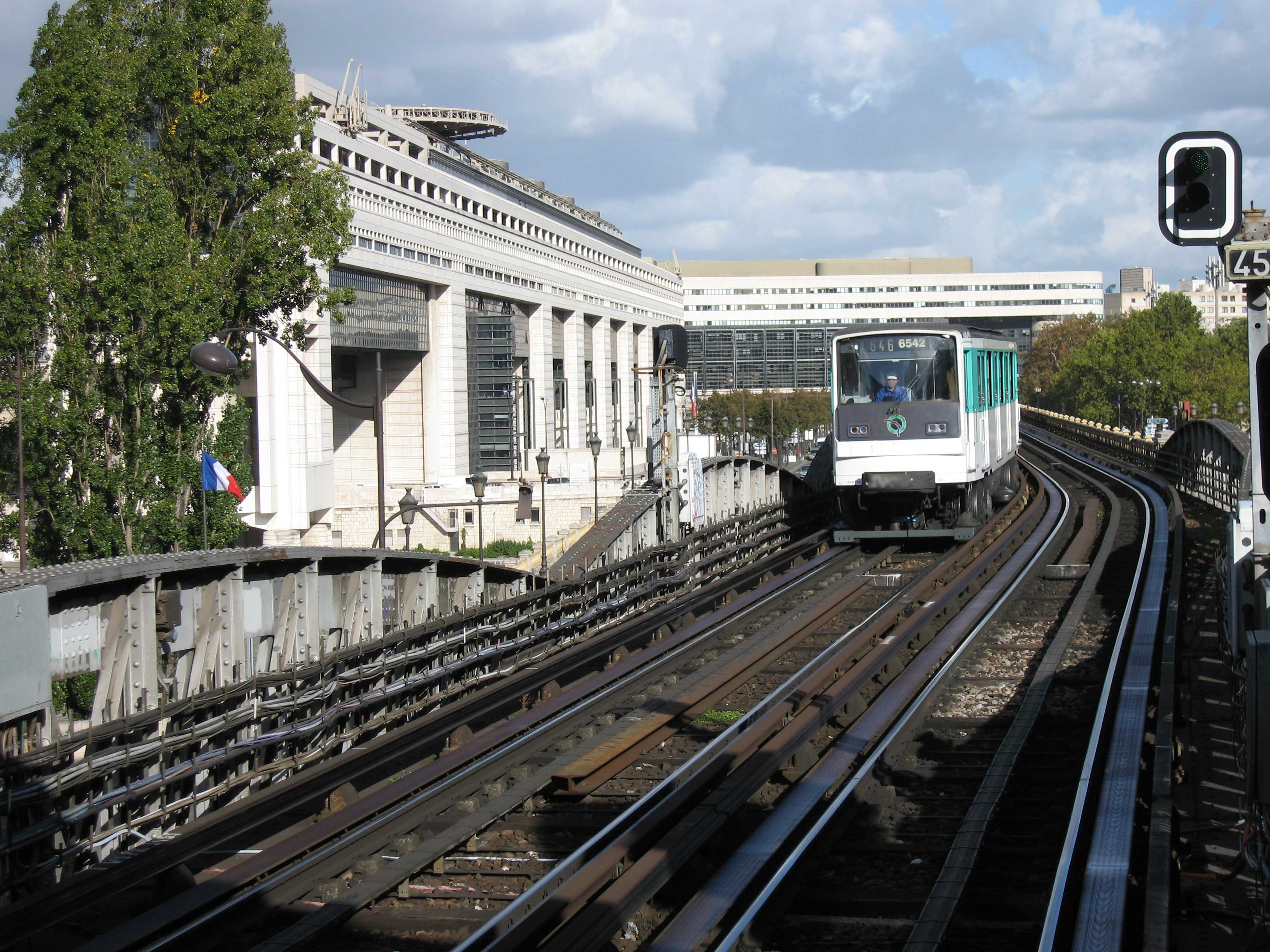 Métro de Paris, Arrivée à la Station Quai de la Gare (ligne 6), Paris, France